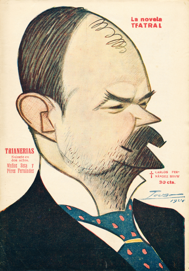 Carlos Fernández Shaw.